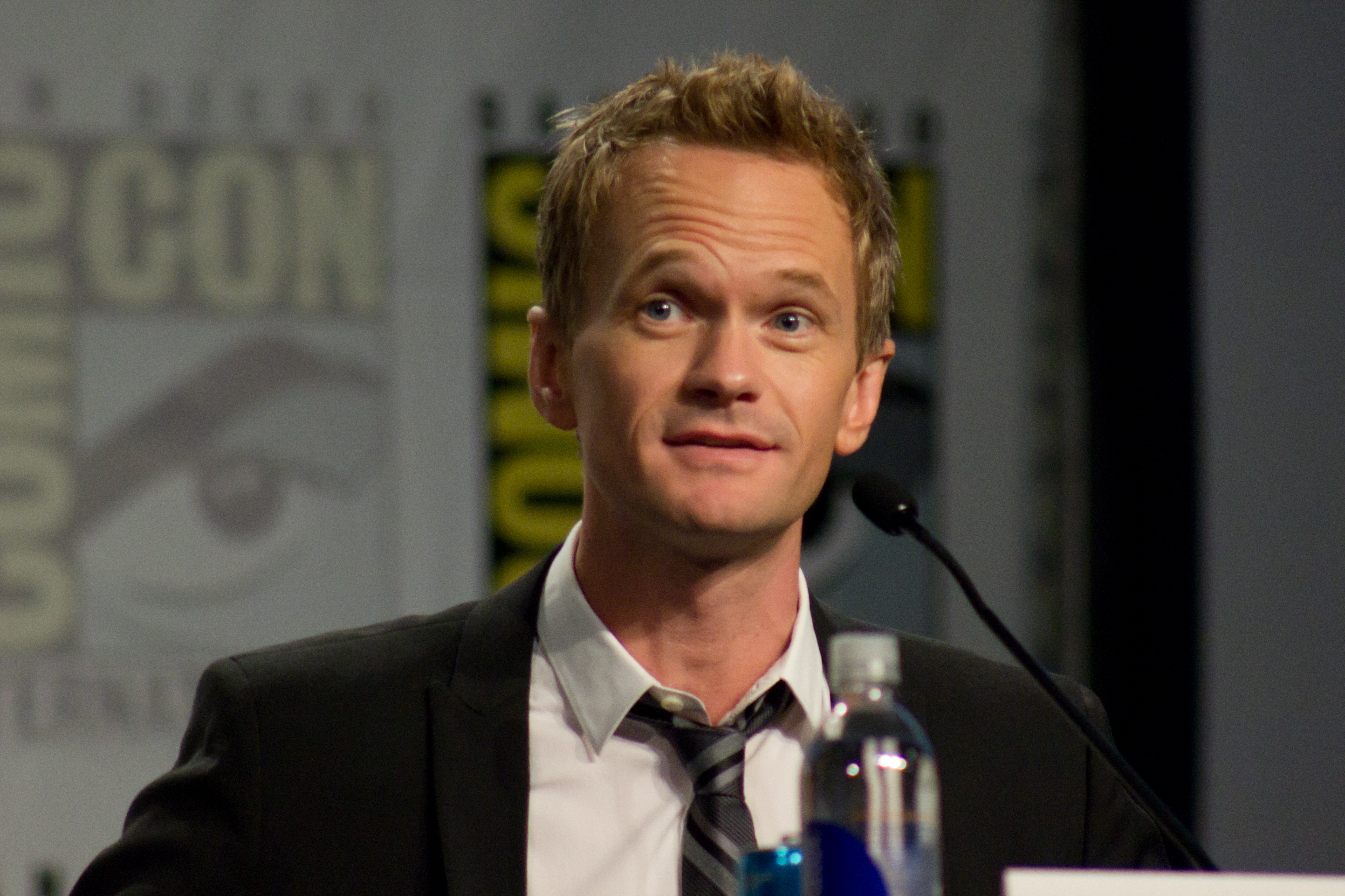 Neil Patrick Harris